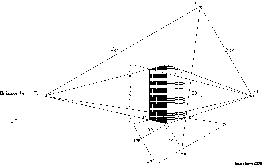 Procedimento geometrico di Restituzione Prospettica (metodo tradizionale)